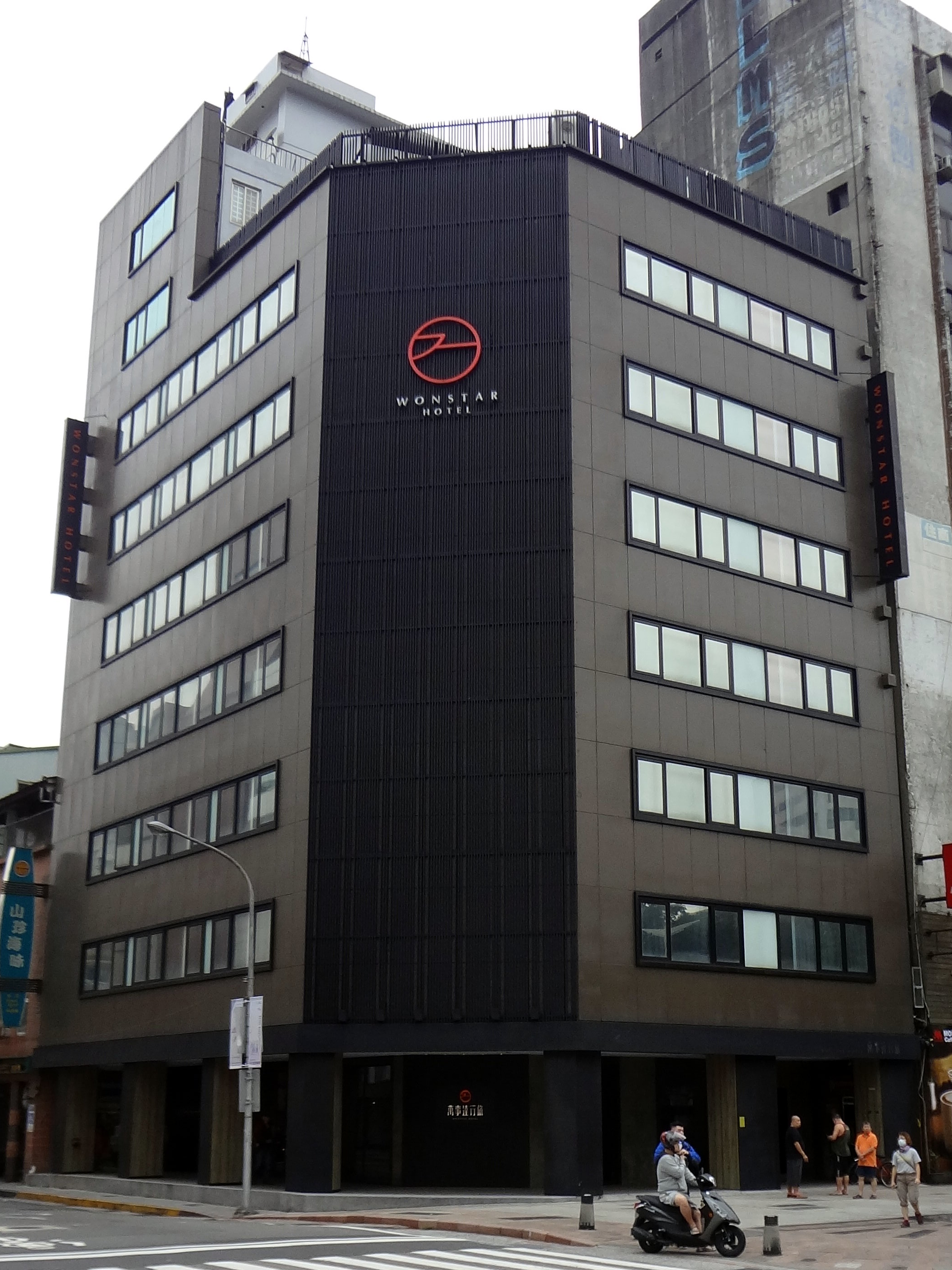 萬事達行旅中華店，地址：臺北市萬華區中華路一段82號。